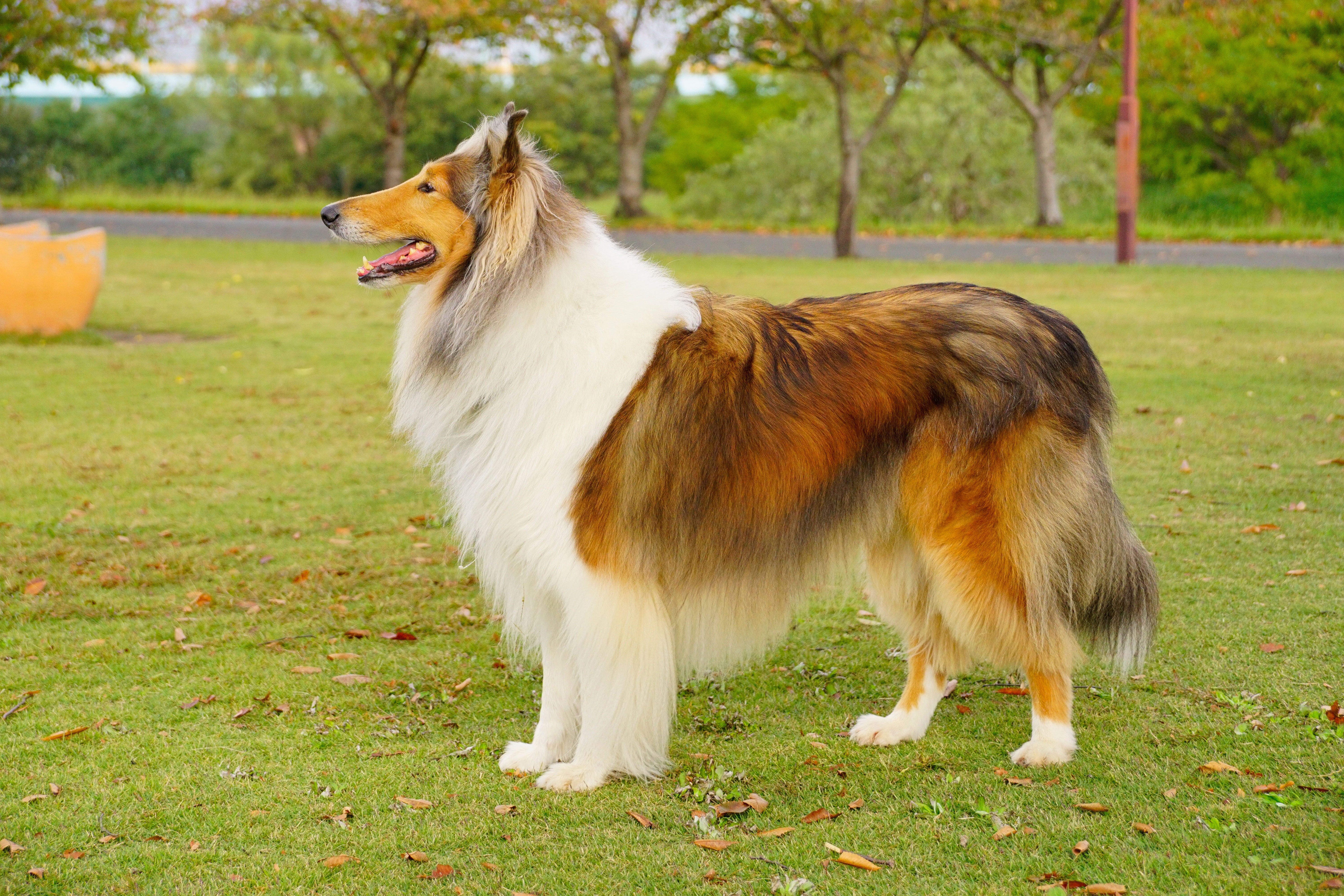 セーブルカラーのラフ・コリー